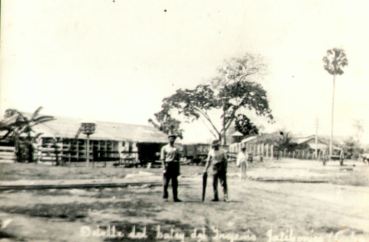 Batey del Ingenio Jatibonico — para azucar, en Jatibonico, Provincia de Sancti Spíritus.